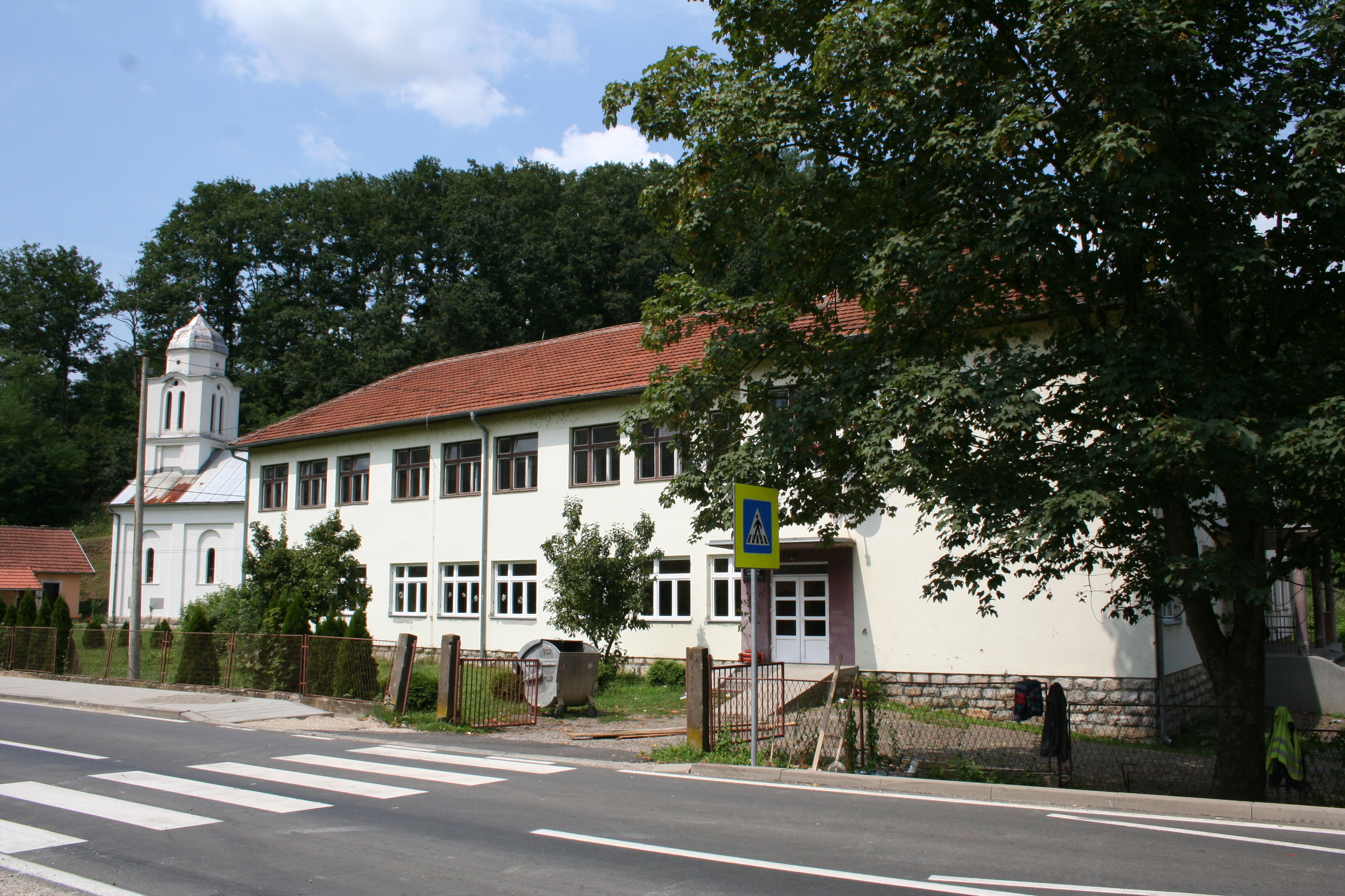 Osnovna škola "Nikola Tesla" Velika Reka